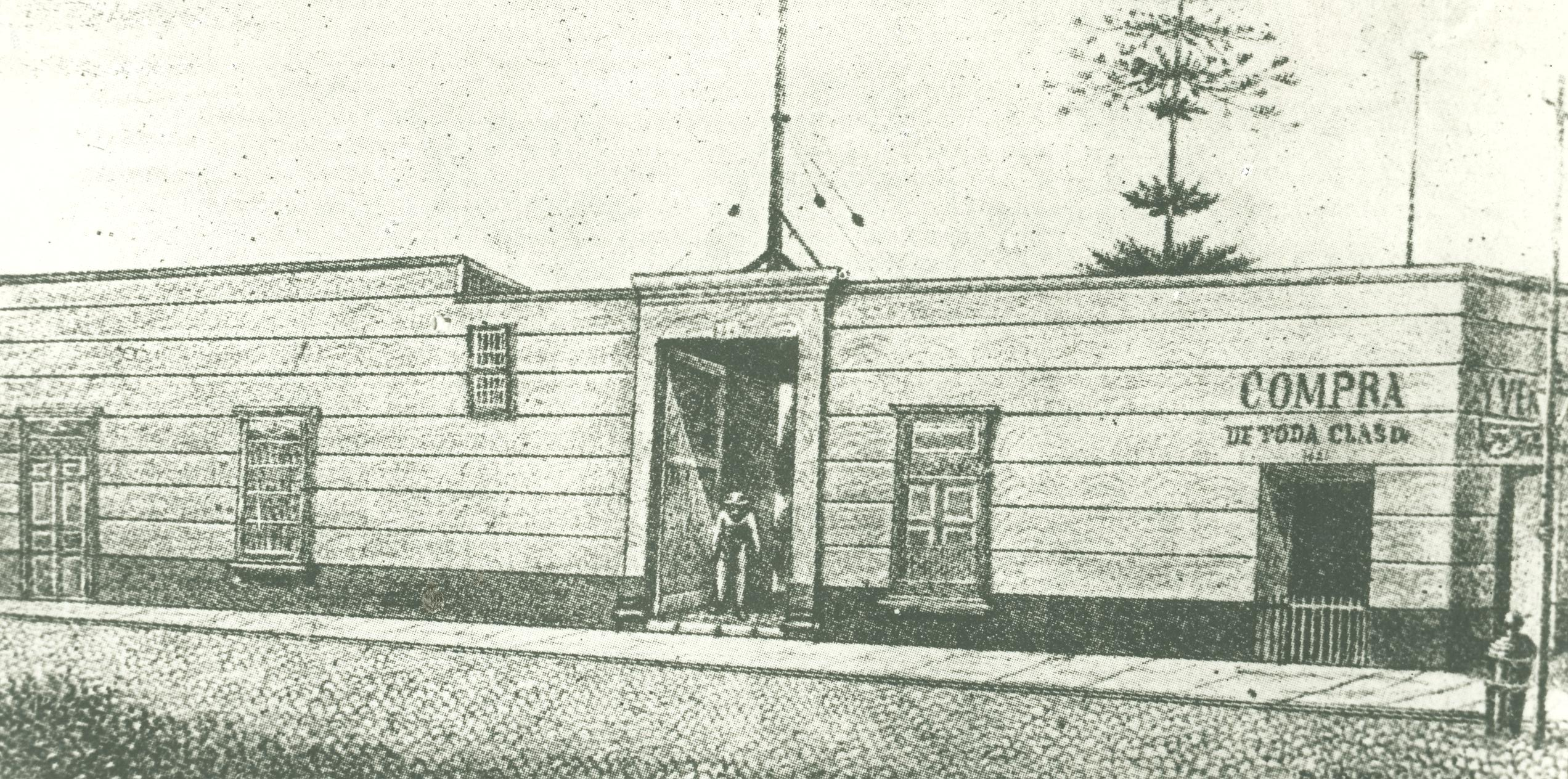 Primer local de la antigua imprenta del Diario "El Comercio". Museo Naval del Peru